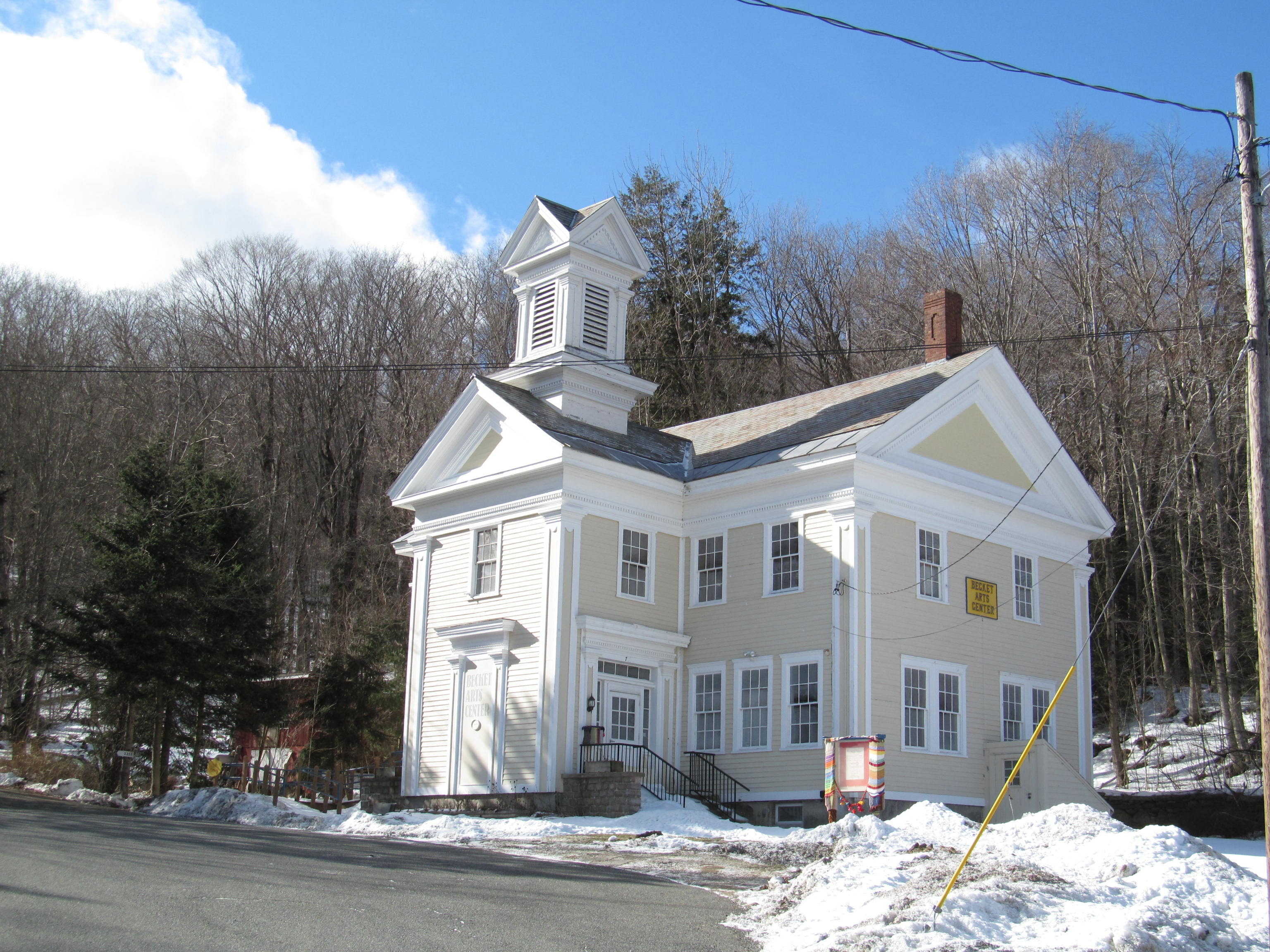 Becket Arts Center, North Becket, Massachusetts